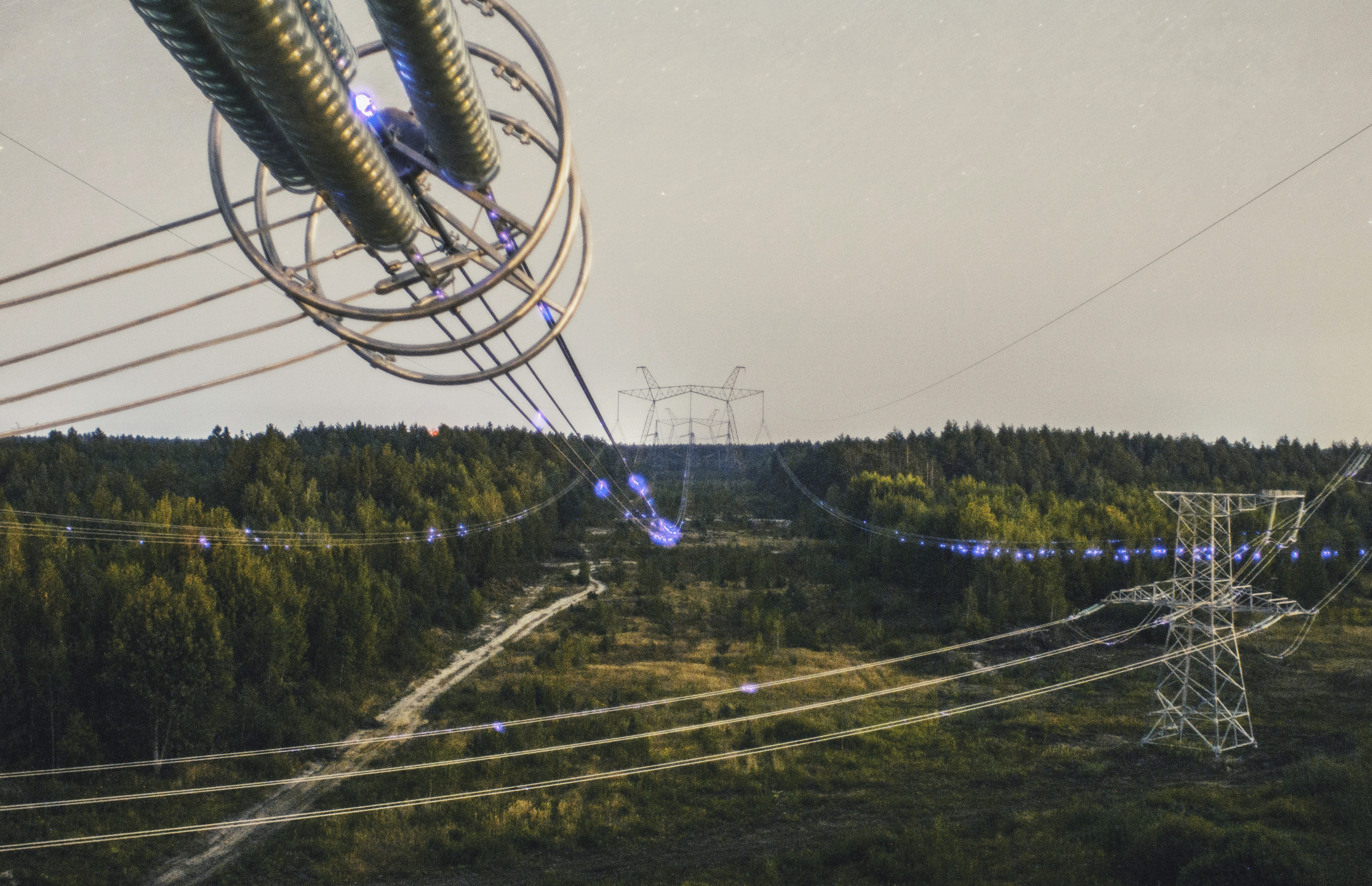 Місце перетину ПЛ 750 кВ ЧАЕС - ПС "Київська" та ПЛ 330 кВ ЧАЕС - ПС "Київська" на території Полісся Київської області.